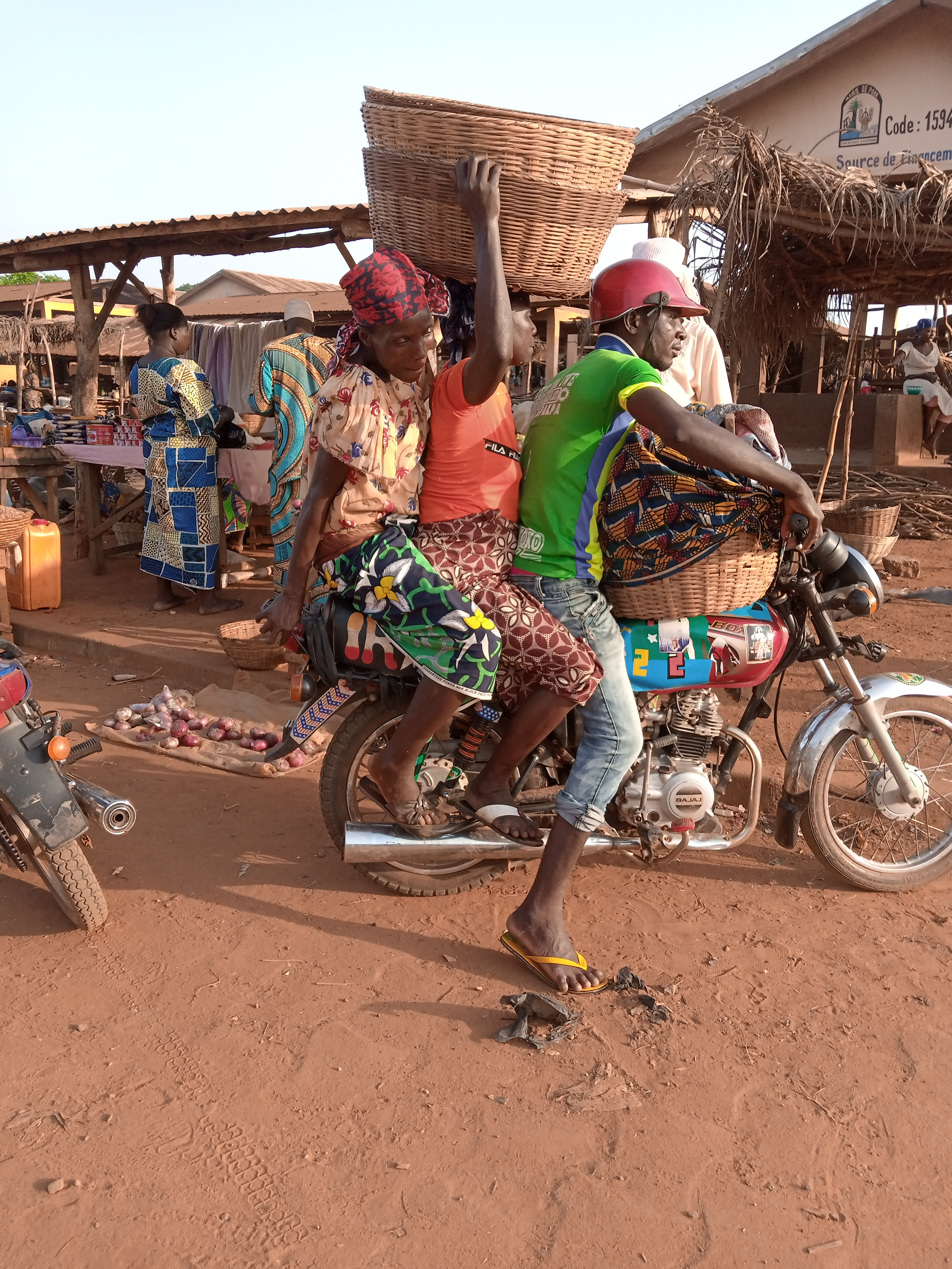 un taxi de Pobé This is an image with the theme "Africa on the Move or Transport" from: Benin